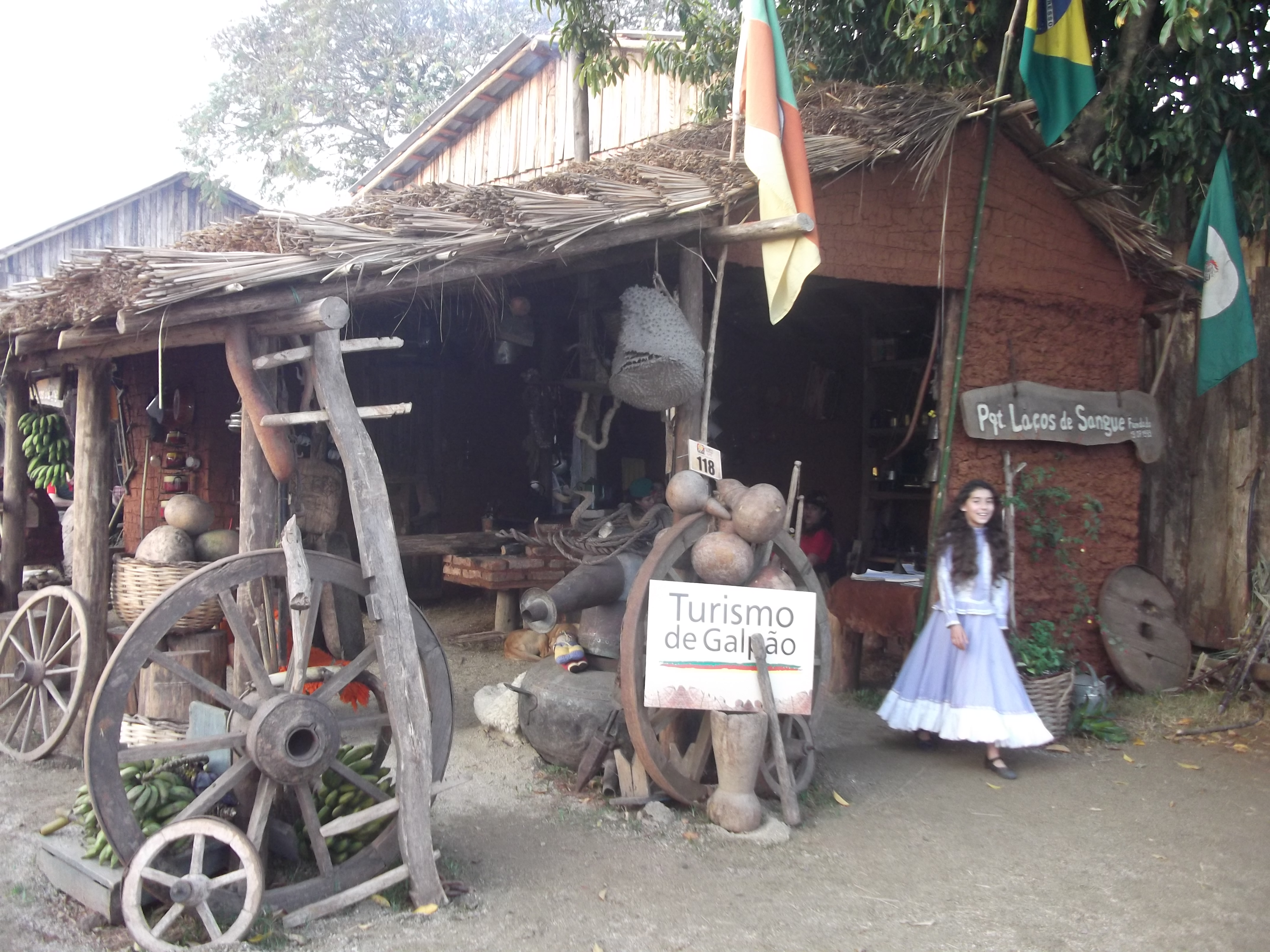 Acampamento Farroupilha, Parque da Harmonia, Porto Alegre, Brasil